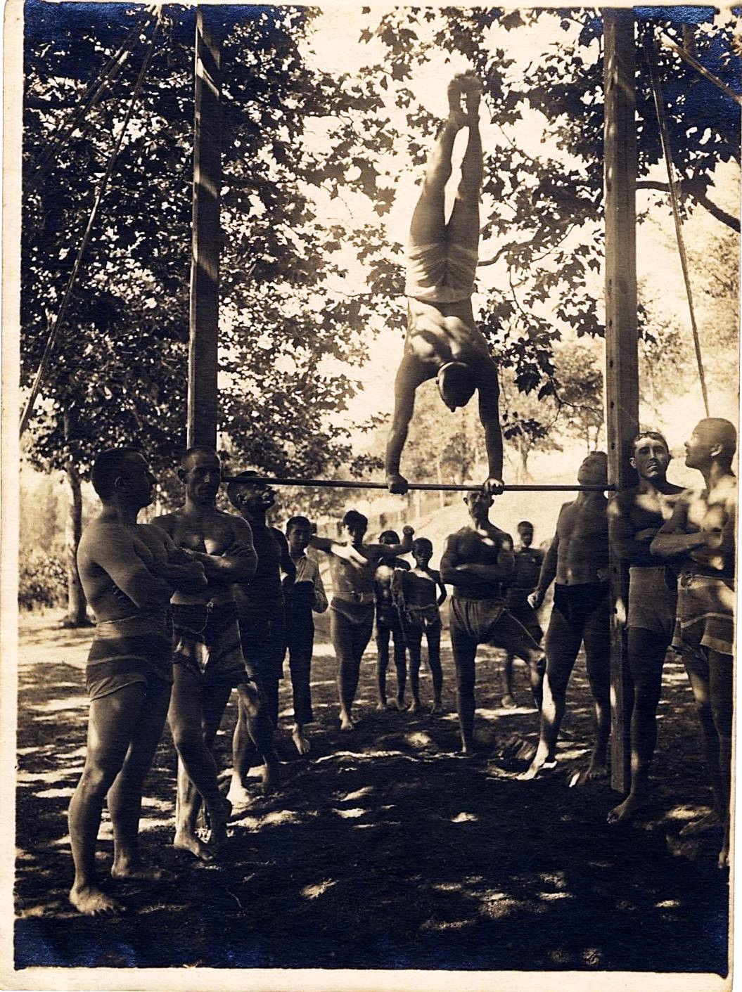 Paul Born Schäfer, nació el 13.06.1888 en Erfurt. Al servicio de la kaiserliche Schutztruppe für Kamerun [Tropas imperiales de protección para el Camerún]. En enero de 1916 el imperio colonial alemán del Camerún se desmorona y miles de personas se baten en retirada hacia la Guinea Española huyendo de las tropas francesas y británicas que paran su persecución al encontrarse con los puestos avanzados españoles. Entonces la administración colonial española se encuentra con un grave problema: han llegado 45.000 personas a Bata (en su mayoría civiles cameruneses de la etnia ewondo) y no hay manera de atenderles por lo que deciden deportar 25.000 personas automáticamente al Camerún. Para complicar más las cosas las autoridades británicas no se fían de los alemanes y exigen al gobernador Ángel Barrera que les entregue los militares y éste finalmente llega a un acuerdo: los 875 soldados y civiles alemanes son enviados en barco a la península ibérica. Este grupo estuvo en Pamplona hasta que acabó la 1ª Guerra mundial (1918)